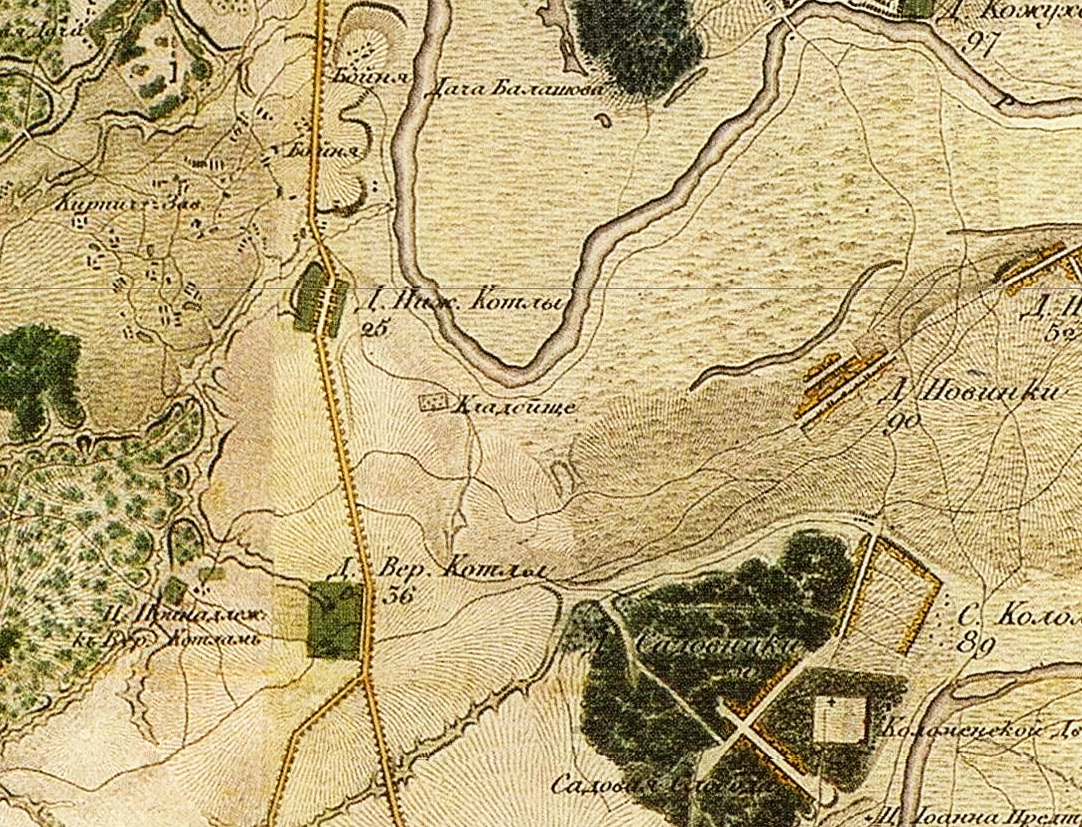 Верхние и Нижние Котлы на карте 1818 года